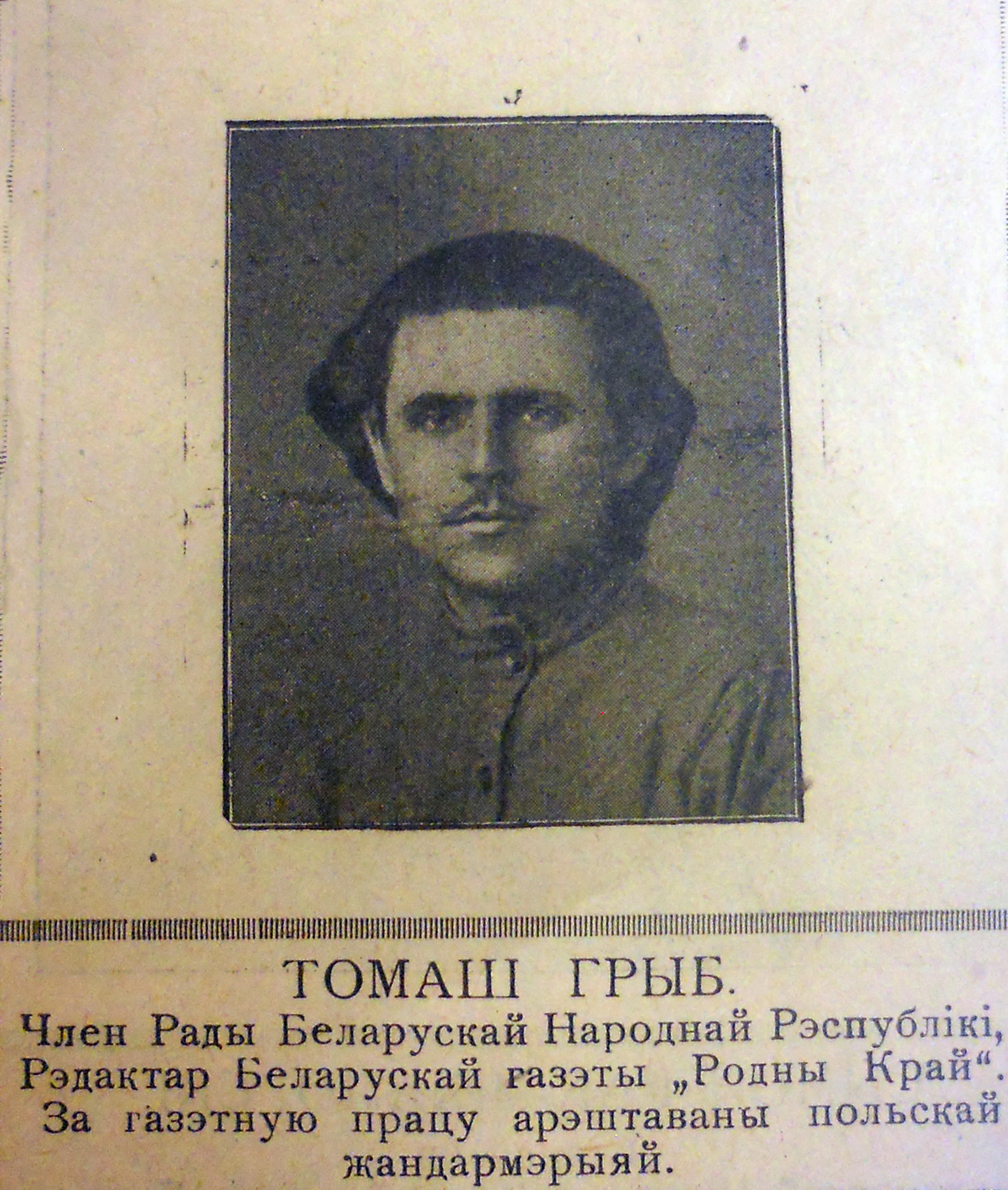 Беларуская (тарашкевіца): Часопіс "На Чужыне". Тамаш Грыб (1895-1938 гг.) - беларускі грамадска-палітычны і культурны дзеяч. г. Рыга, 1920 г.